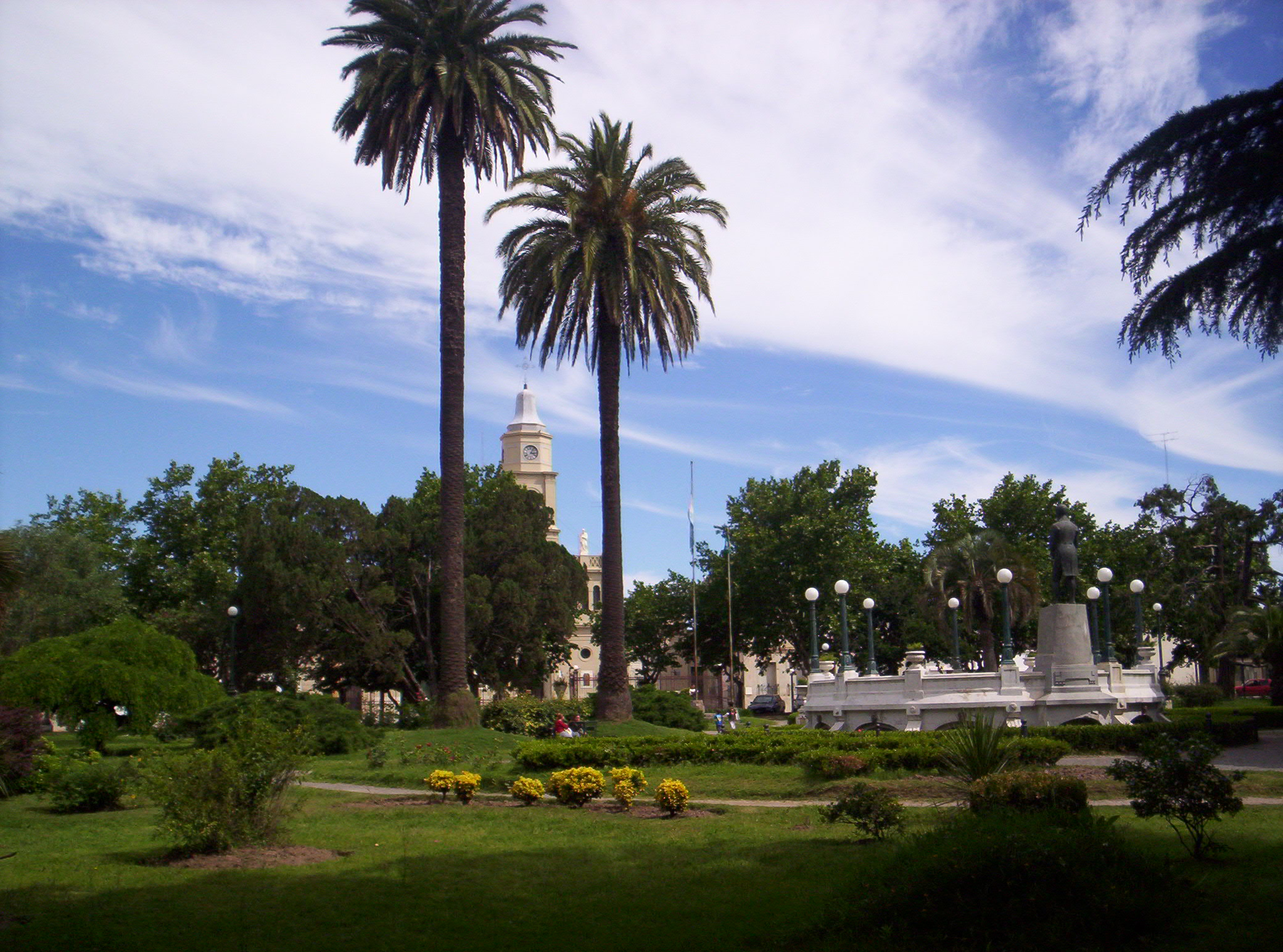 Plaza "Ruiz de Arellano", San Antonio de Areco.